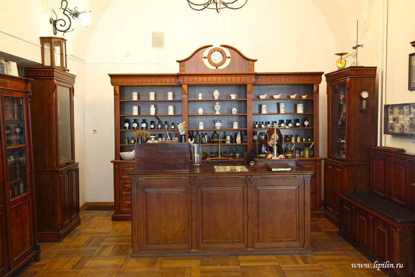 Гродна. Музей-аптэка